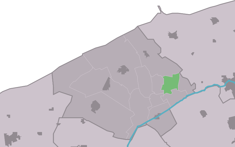 Kaartsje fan himrik fan Reitsum